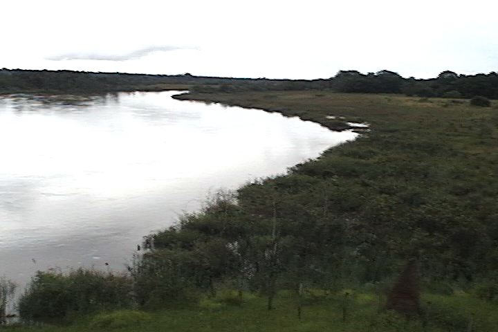 Rio Verde, divisa entre Três Lagoas e Brasilândia.